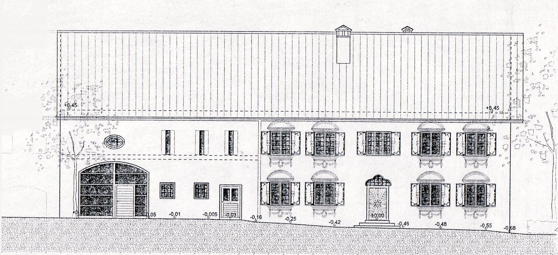 Rekonstruktionszeichnung der Südfassade des Pfarrhofes in Gutenberg (Oberostendorf), 1797